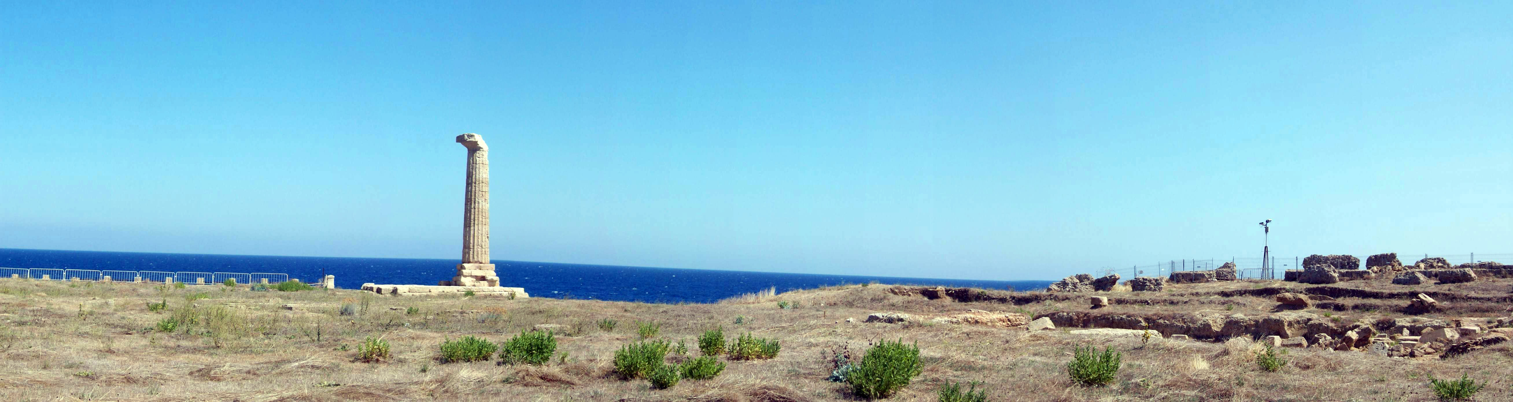 Panoramica dell'area archeologica di Capo Colonna